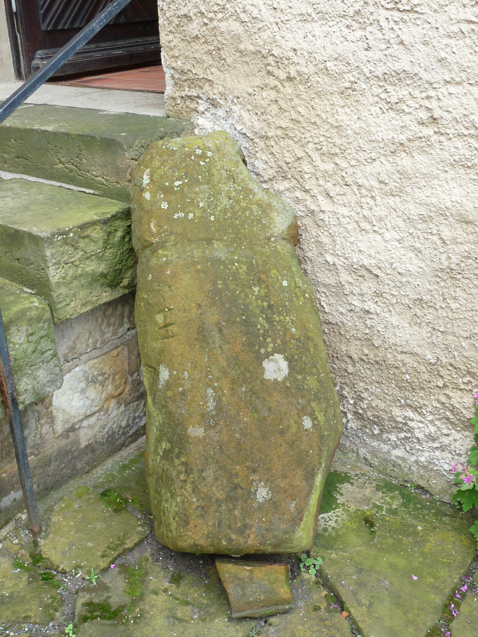 Der Originalmenhir steht im Jägergarten des Schloßmuseums Quedlinburg und ist leider schlecht oder nicht gekennzeichnet.